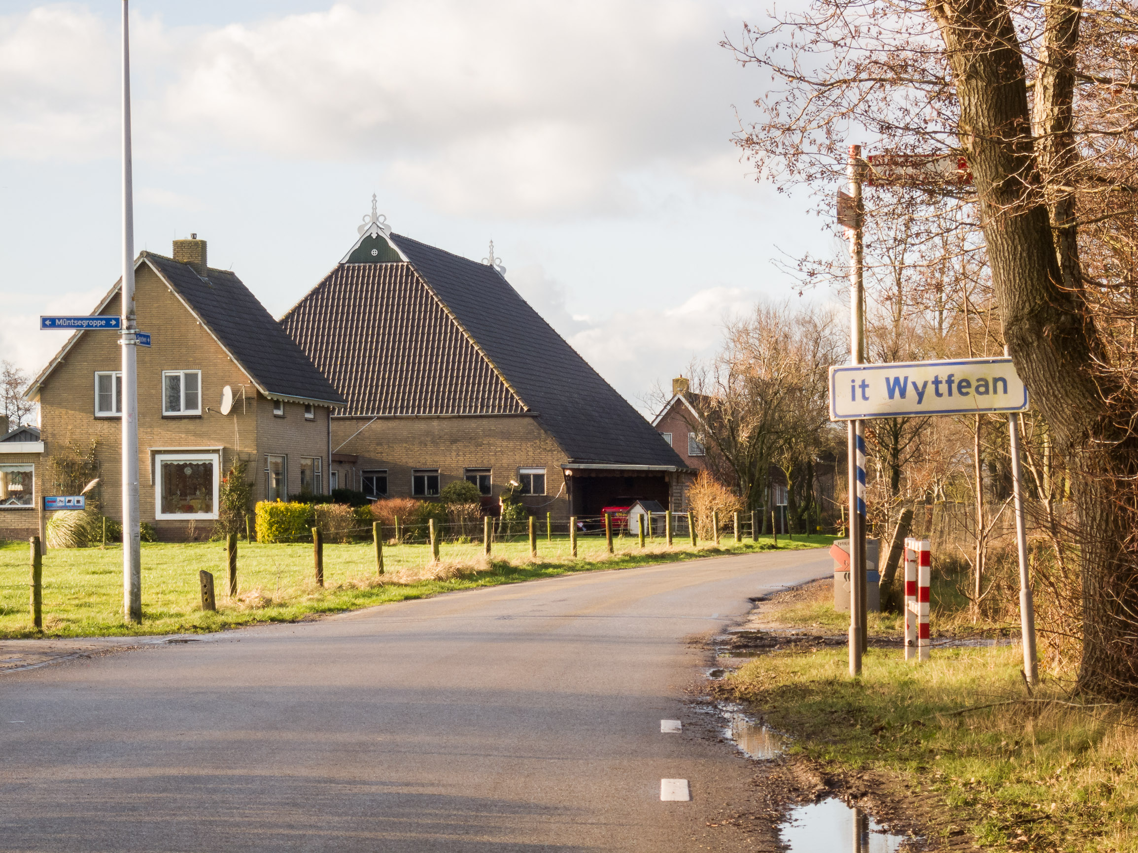 it Wytfean is een streek tussen Harkema, Rottevalle en Oostermeer.